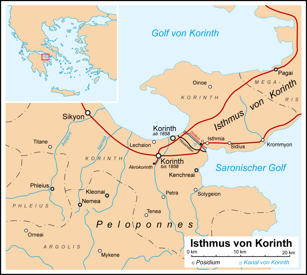 Karte des Isthmus von Korinth